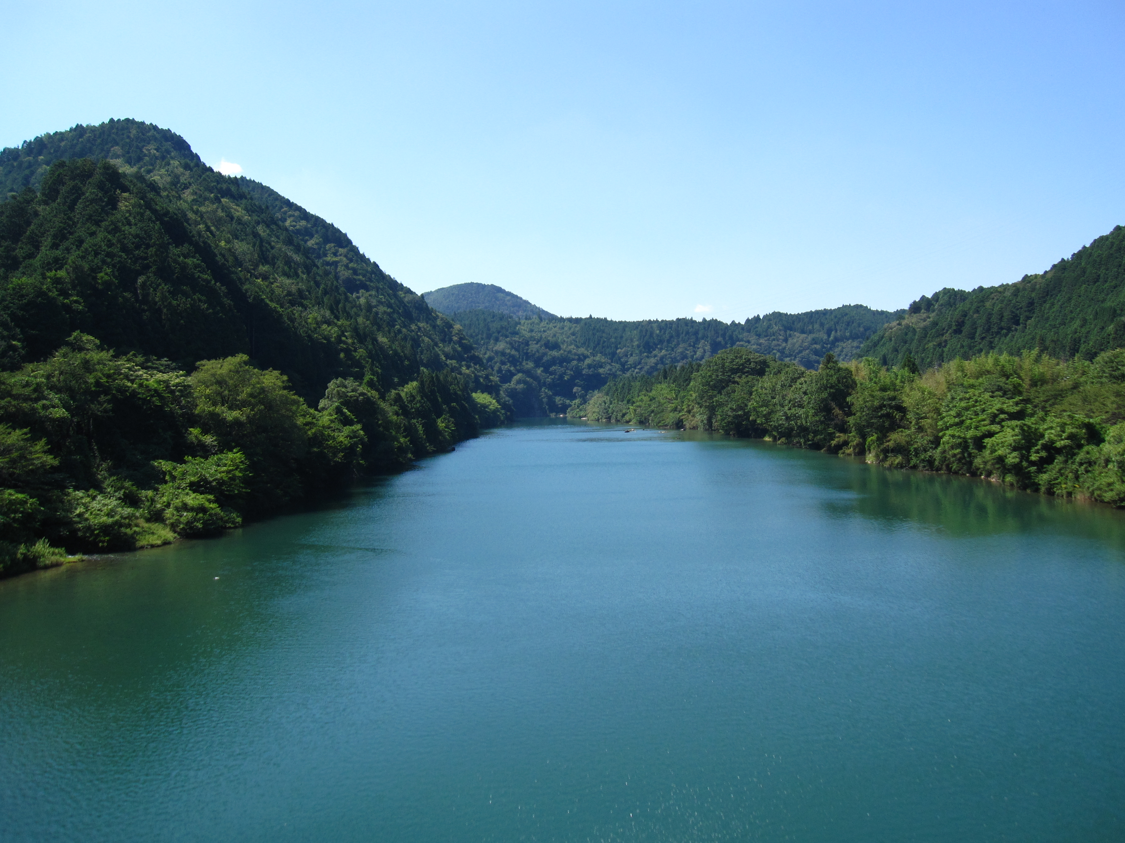 藤倉峡七宗ダムより望む